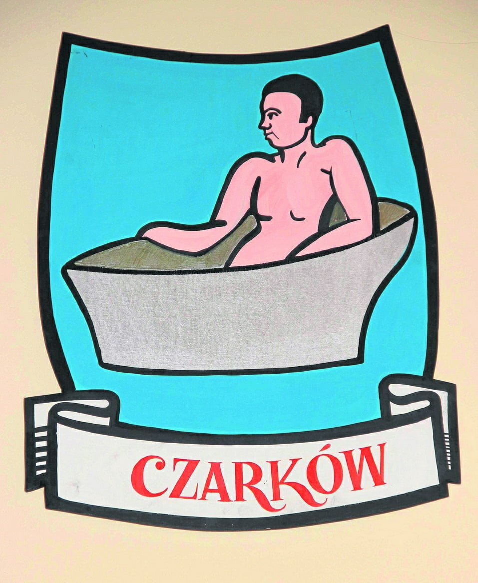 Herb Czarkowa